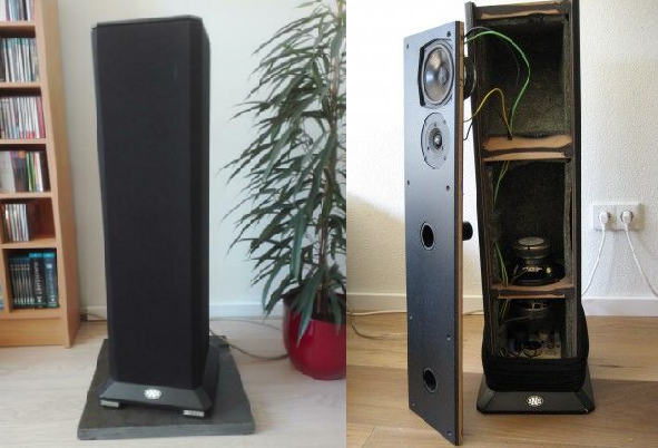 Het vooraanzicht van de BNS soundcolumn I en ook de binnenkant.